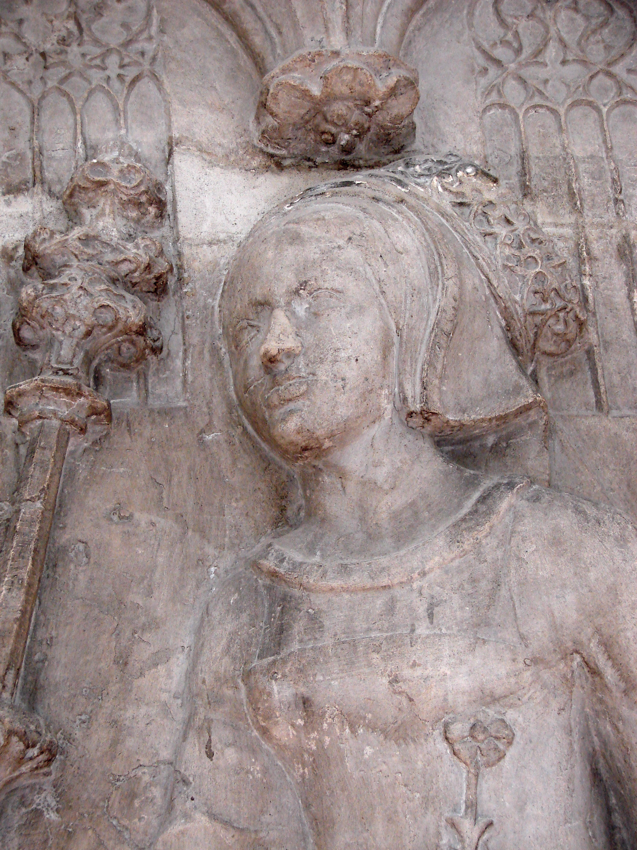 Elisabeth, eller Isabella af Burgund, Elisabeth af Østrig, gift med Christian II, ved den udvendige trappe til Riddersalen på middelalderens Københavns Slot, hugget i gotlandsk kalksten formentlig af Morten Bussert (ufærdig), Nationalmuséet i København